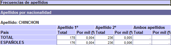 Relación TOTAL (incluye extranjeros) y ESPAÑOLES. Datos procedentes de la Estadística del Padrón Continuo a fecha 01/01/2013 (INE, España). Por secreto estadístico sólo se muestran los apellidos cuya frecuencia es mayor que 5 en alguno de los dos apellidos para el total nacional.